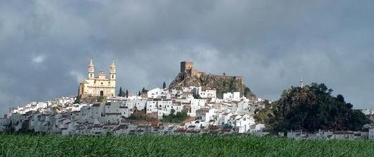 Iglesia y Castillo de Olvera (Cádiz)